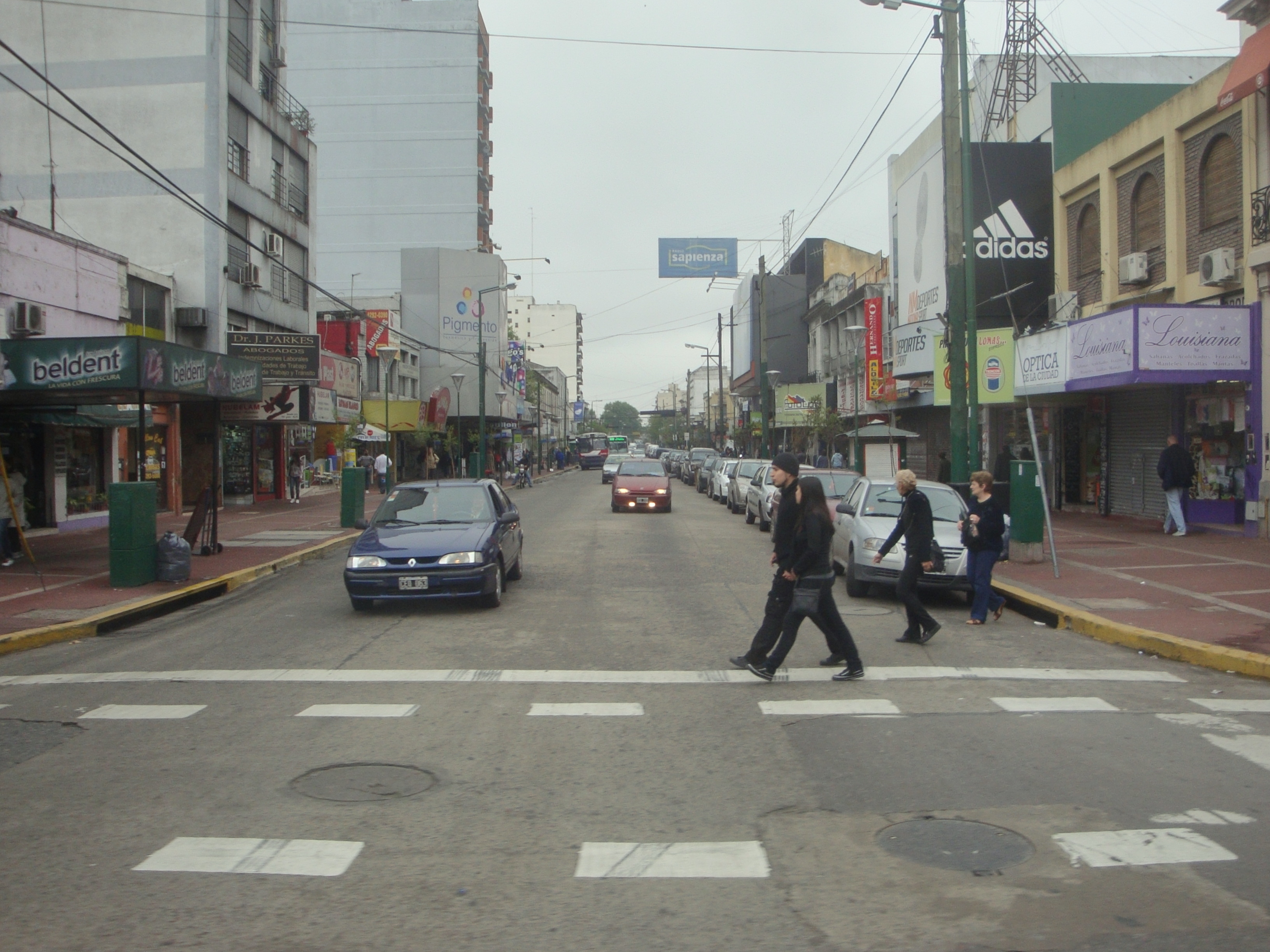 La calle Mariano Boedo en el centro comercial de Lomas de Zamora.